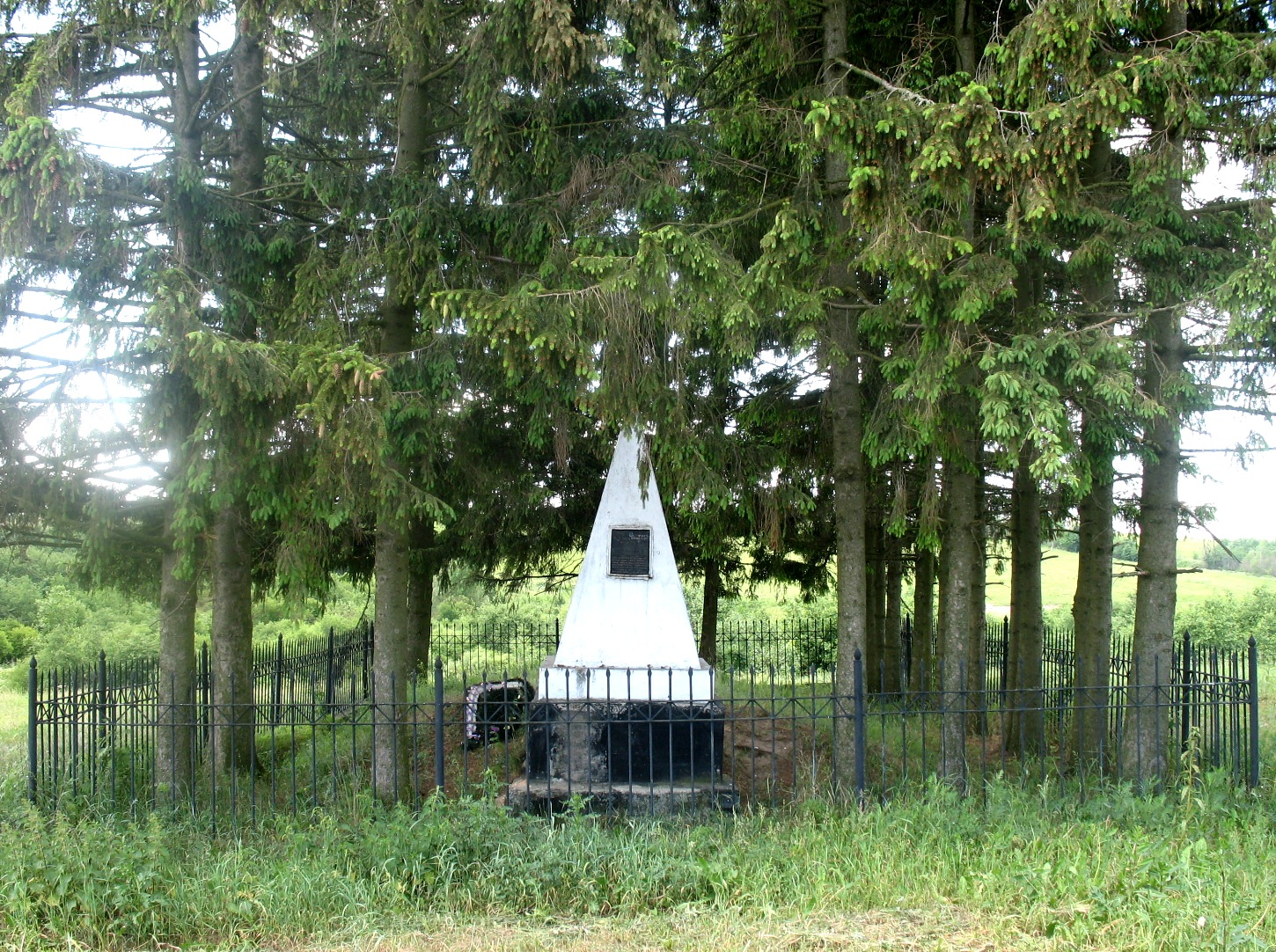 Памятник на месте расстрела евреев Толочина в марте 1942 года.